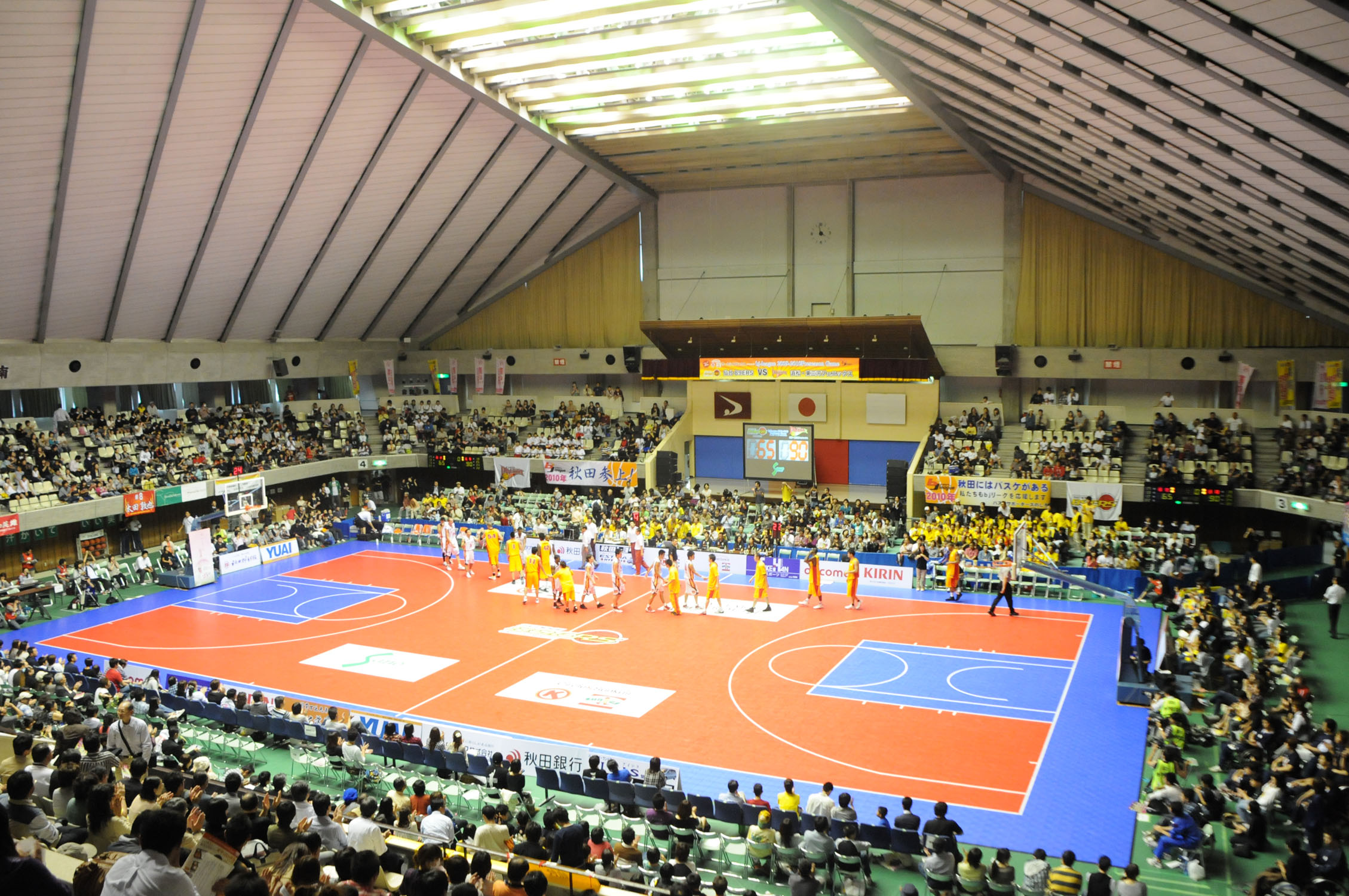 秋田県立体育館、2009年9月23日